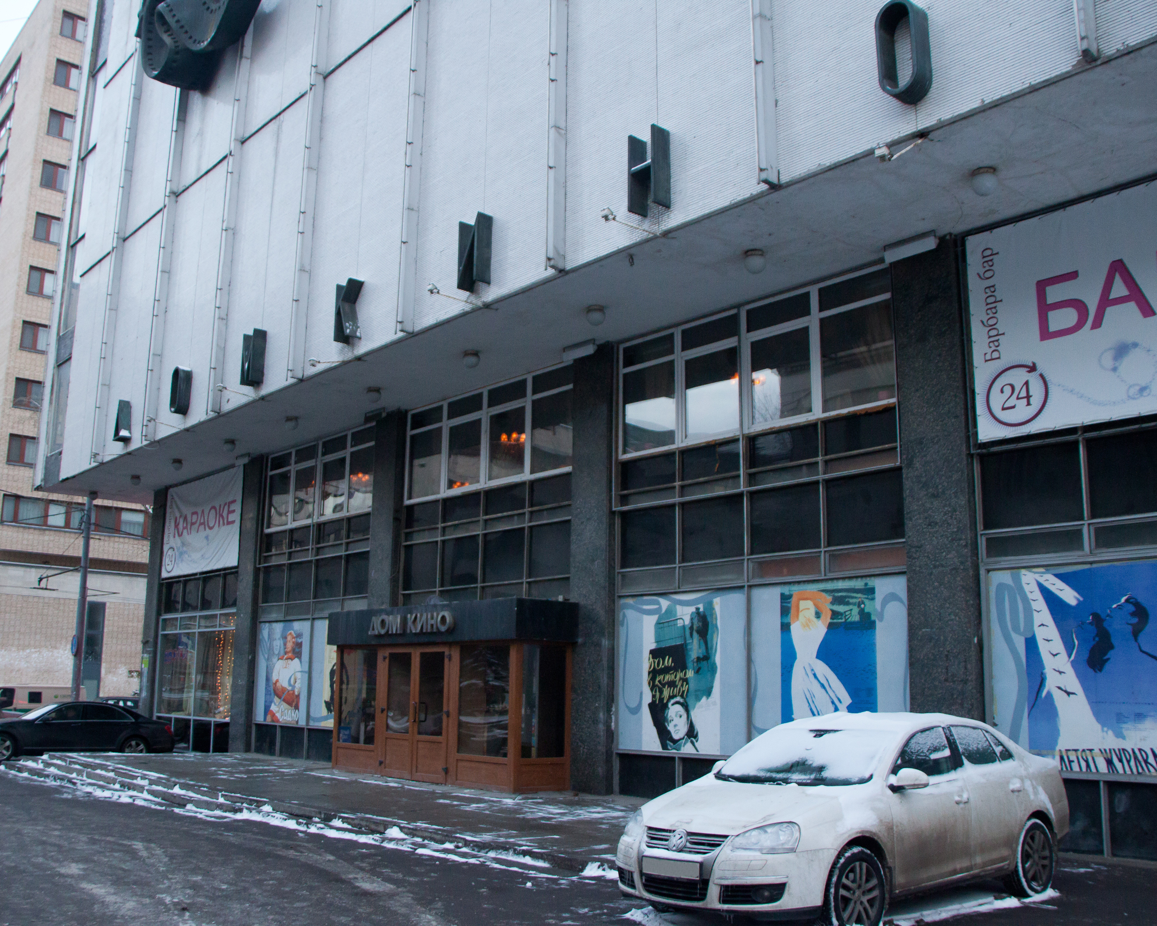 Центральный Дом кино, Москва. Главный вход